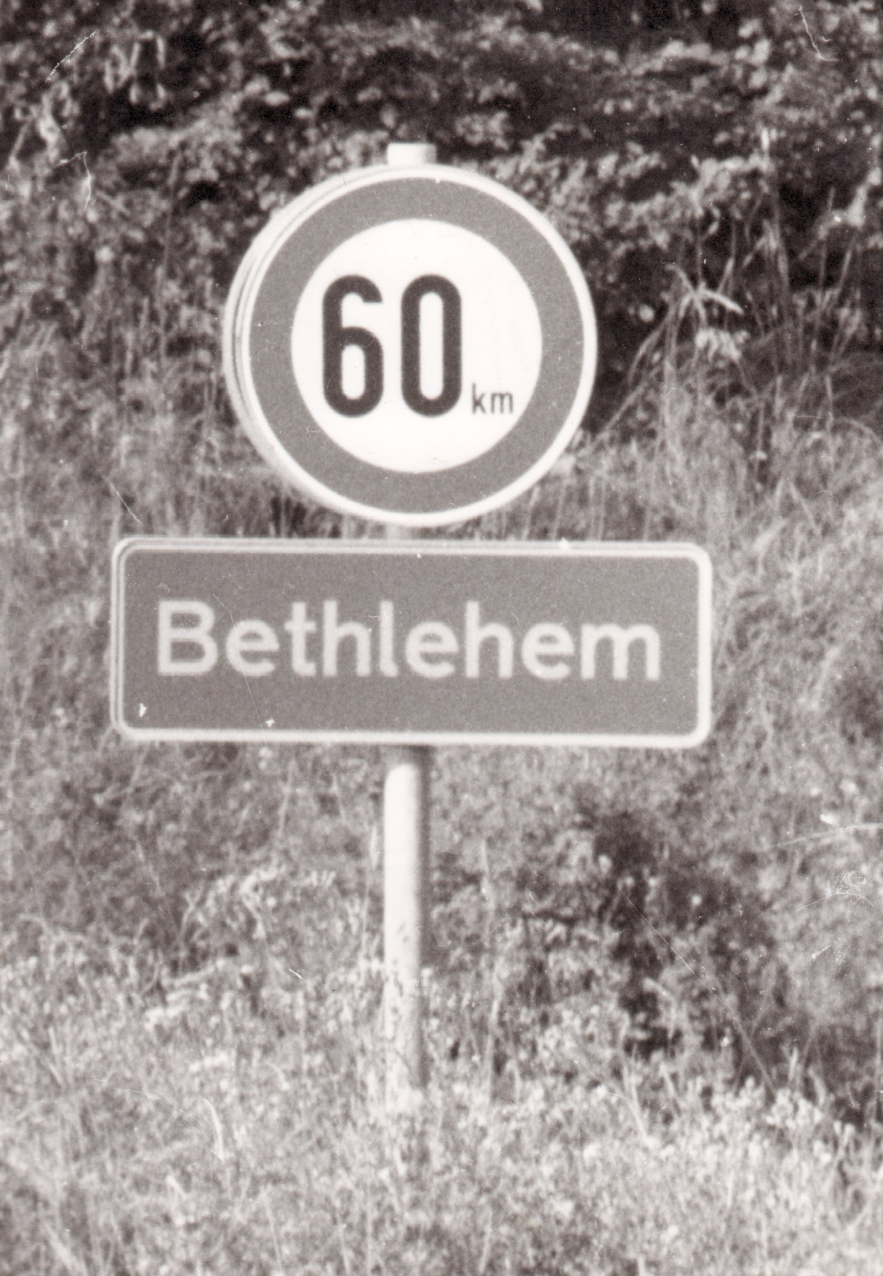 Ortsteil Bethlehem, Lengenwang, Allgäu